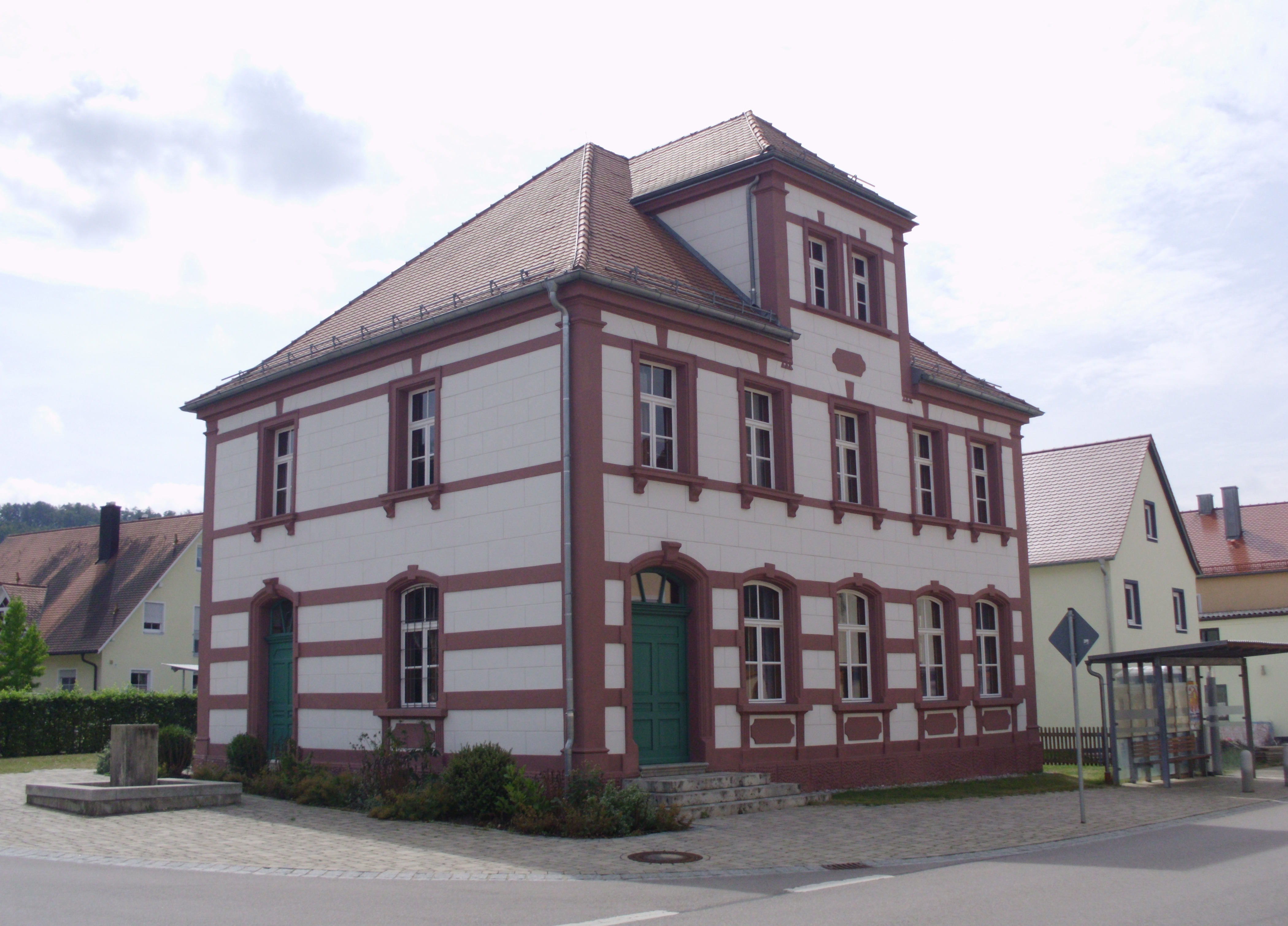 Untermässing, Ortsteil von Greding im mittelfränkischen Landkreis Roth, Baudenkmal ehemalige Schule (heute Pfarrheim)